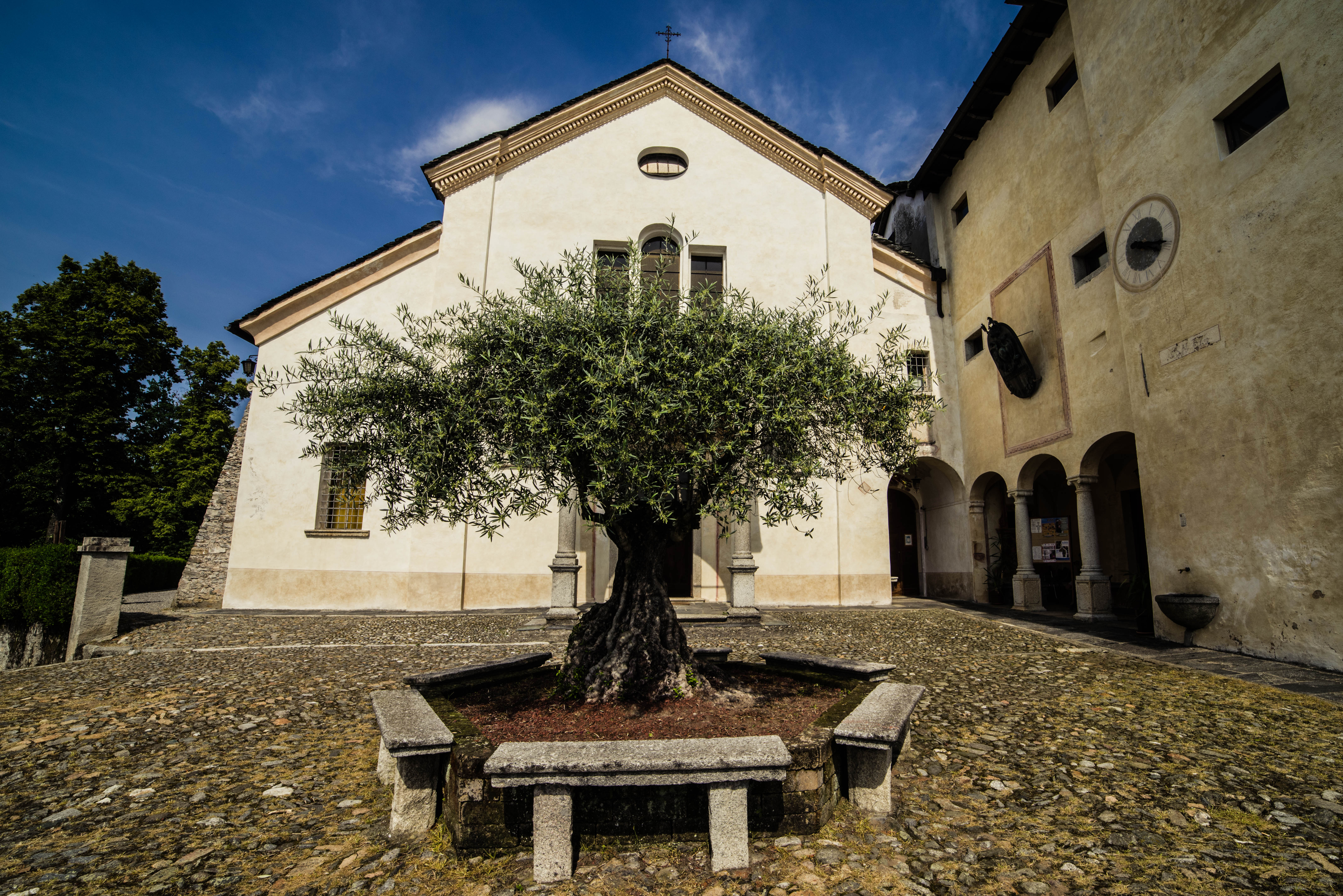 Riserva naturale del Monte Mesma (Q3936913) Dopo la morte del quadricentennale tiglio, un ulivo è stato piantato di fronte alla chiesa del convento in cima al monte Mesma